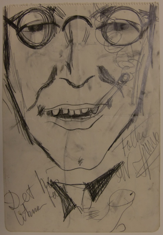 Porträtt Gunnar W Lundberg av Folke Ljung